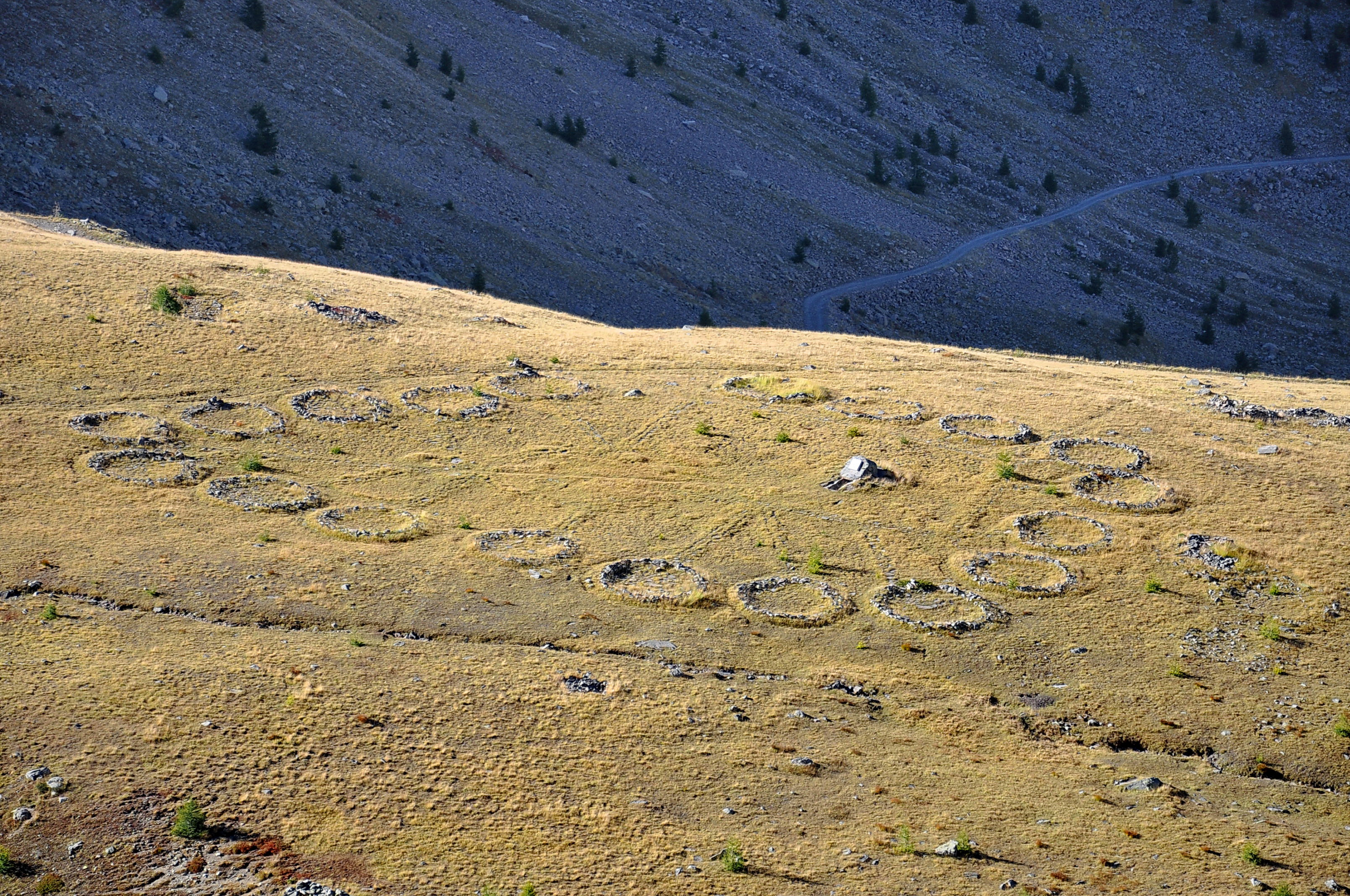 Site de la pierre dite d'Hannibal, ruines d'un campement d'altitude intégré à la ligne Maginot des Alpes.